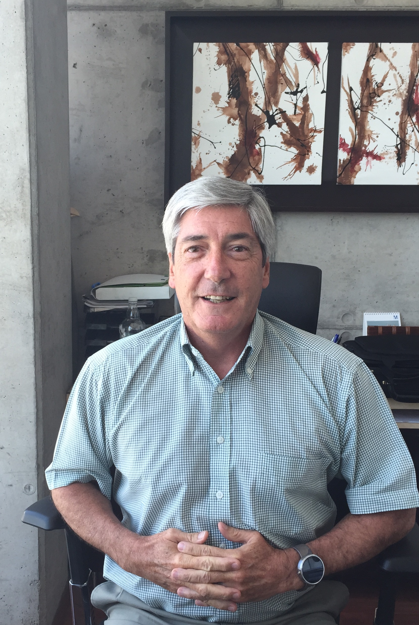 Prof. Arturo Squella Serrano